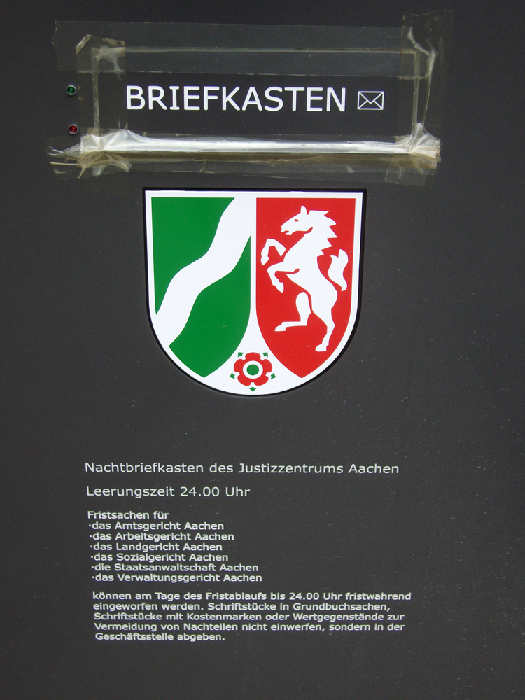 Nachtbriefkasten